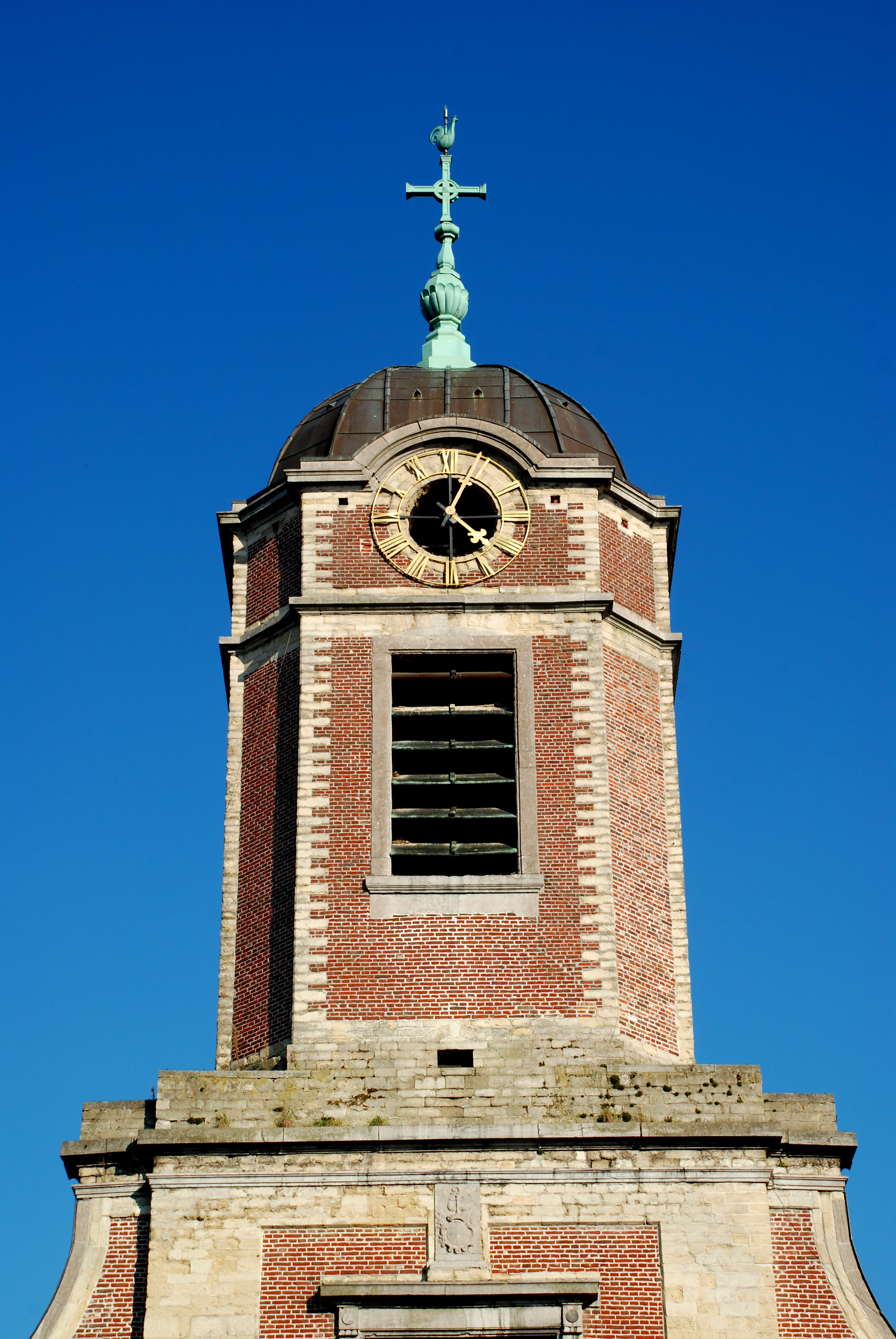 Belgique - Bruxelles - Église Saint-Pierre d'Uccle